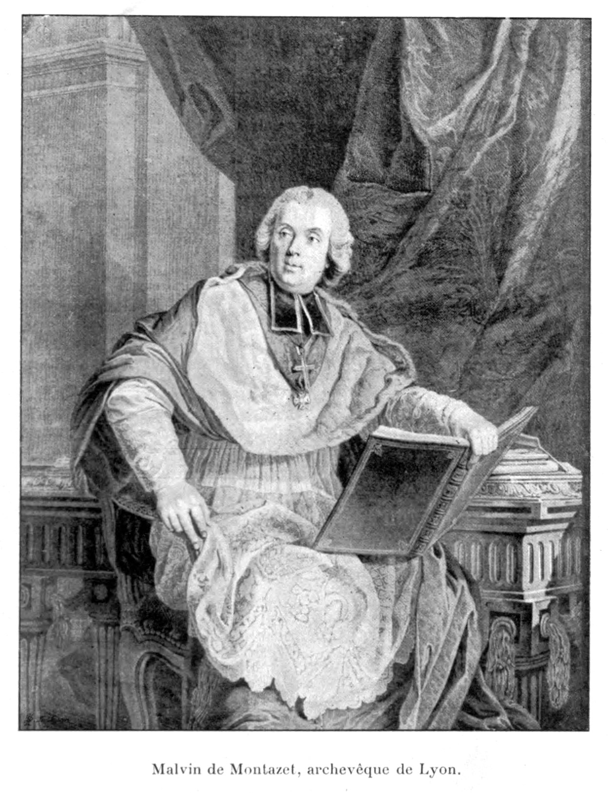 Illustrations pour l'Histoire des églises et chapelles de Lyon